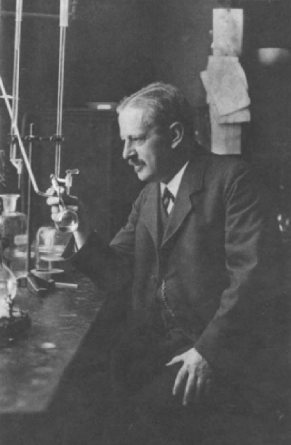 Siegmund Gabriel, Sigismund Gabriel (* 7. November 1851 in Berlin; † 22. März 1924 in Berlin) als a.o. Professor in Berlin